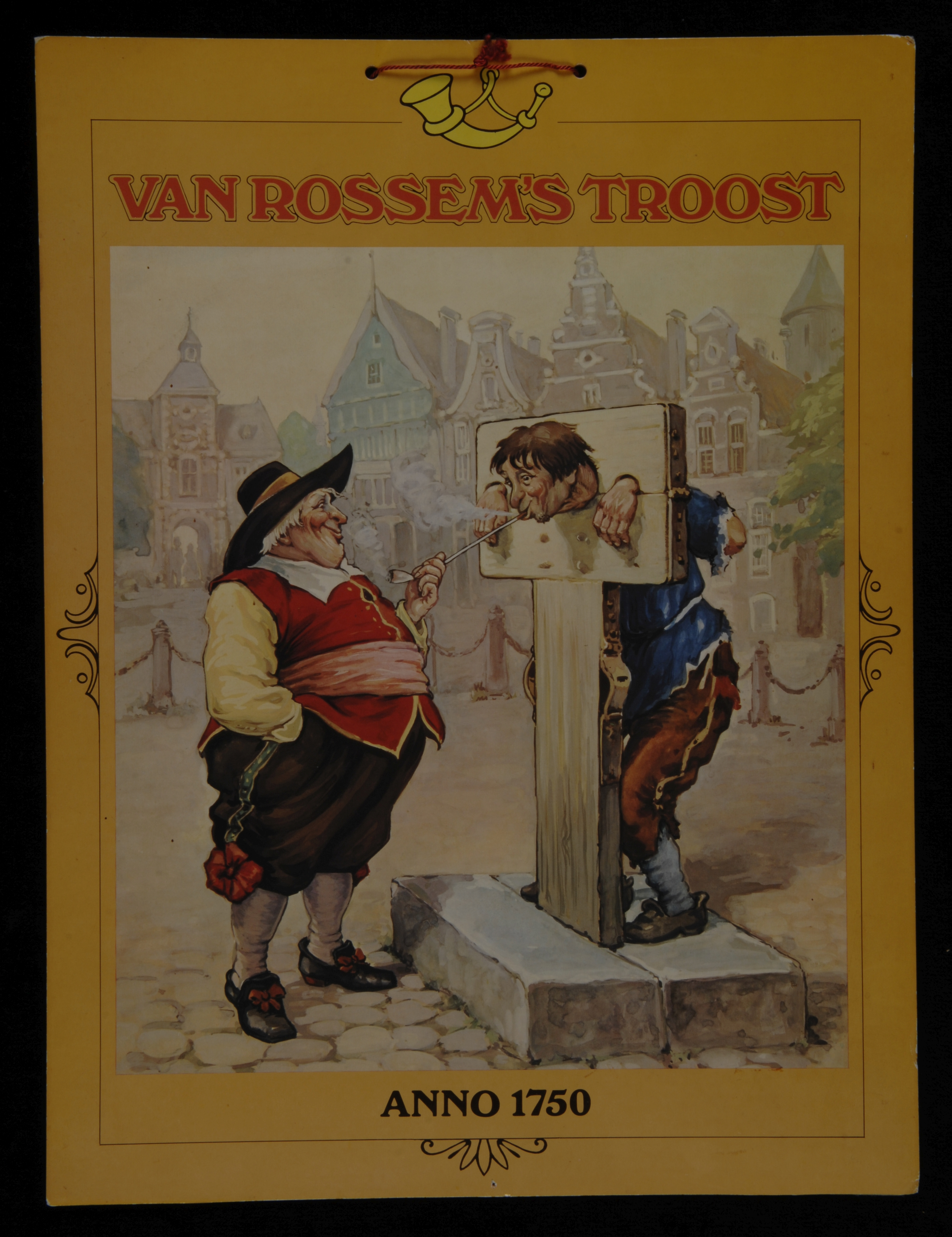 Objectgegevens Titel: Reclamebord met man aan schandpaal met “van Rossem´s troost” Beschrijving: Reclamebord, met een man aan de schandpaal en een man helpt hem bij het roken van een pijp, beide in 18e eeuwse kleding, er boven in geel een posthoorn, op de achtergrond huizen. Trefwoorden: reclamebord, reclameMateriaal: , informatievorm Opschrift / merk: "VAN ROSSEM´S TROOST / ANNO 1750" Vervaardiger: opdrachtgever: J. & A.C. v. Rossem Datering: 1920 - 1950 materiaal karton Afmetingen: (cm) hg 35,8 / br 27,0 / dp 0,2 Associatie: Rotterdam, tabak, roken, Troost, Van Rossem, reclame Vorm & decoratie: figuur, man, schandpaal, pijp, huis, posthoorn Inventarisnr: Museum Rotterdam 90517